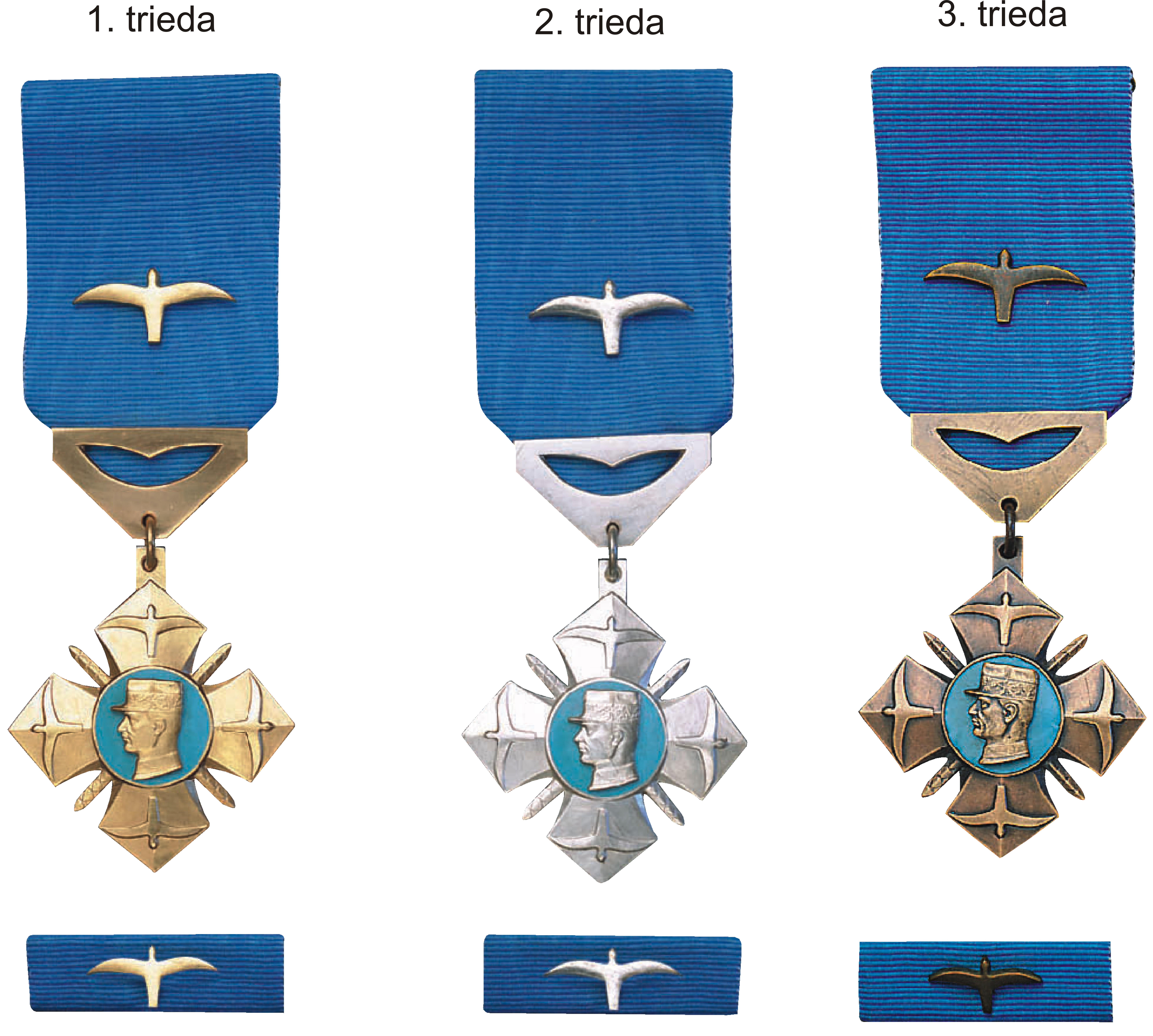 Štátne významenie Slovenskej republiky Kríž Milana Rastislava Štefánika Dekorácie I. triedy vyznamenania tvorí: kríž razený zo striebra, pozlátený s prievlečnou stuhou, stužka a rozeta. Kríž má priemer 44 mm. Prievlečná stuha je hodvábna, 40 mm široká, blankytnej farby, v strede s miniatúrnym vtákom sokolom, razeným zo striebra, pozláteným. Stužka je hodvábna, blankytnej farby, dlhá 18 mm, široká 10 mm. V strede stužky je miniatúrny strieborný, pozlátený vták sokol so šírkou 12 mm a výškou 8 mm. Rozeta má tvar kruhu s priemerom 15 mm, je hodvábna, blankytnej farby. V strede rozety je miniatúrny strieborný, pozlátený vták sokol so šírkou 12 mm a výškou 8 mm. Dekorácie II. triedy vyznamenania tvorí: kríž razený zo striebra s prievlečnou stuhou, stužka a rozeta. Prievlečná stuha je rovnaká ako pri I. triede, ale v strede s miniatúrnym vtákom sokolom, razeným zo striebra. Dekorácie III. triedy vyznamenania tvorí: kríž razený z bronzu s prievlečnou stuhou, stužka a rozeta.